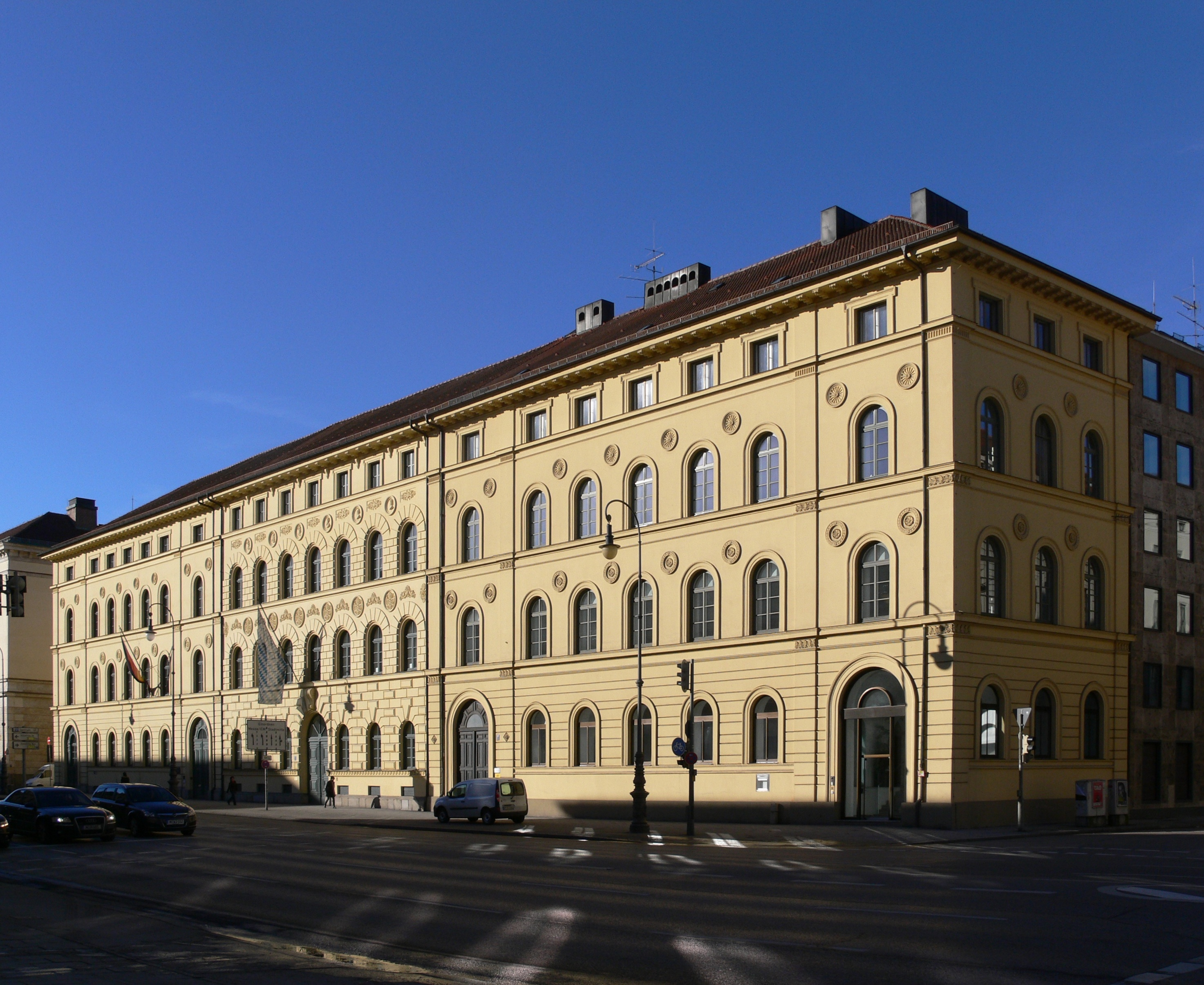 München, LudwigstraßeLudwigstraße 15-19 von Nordosten, rechts die Theresienstraße; ganz links Ludwigstraße 15: Bayerisches Landessozialgericht